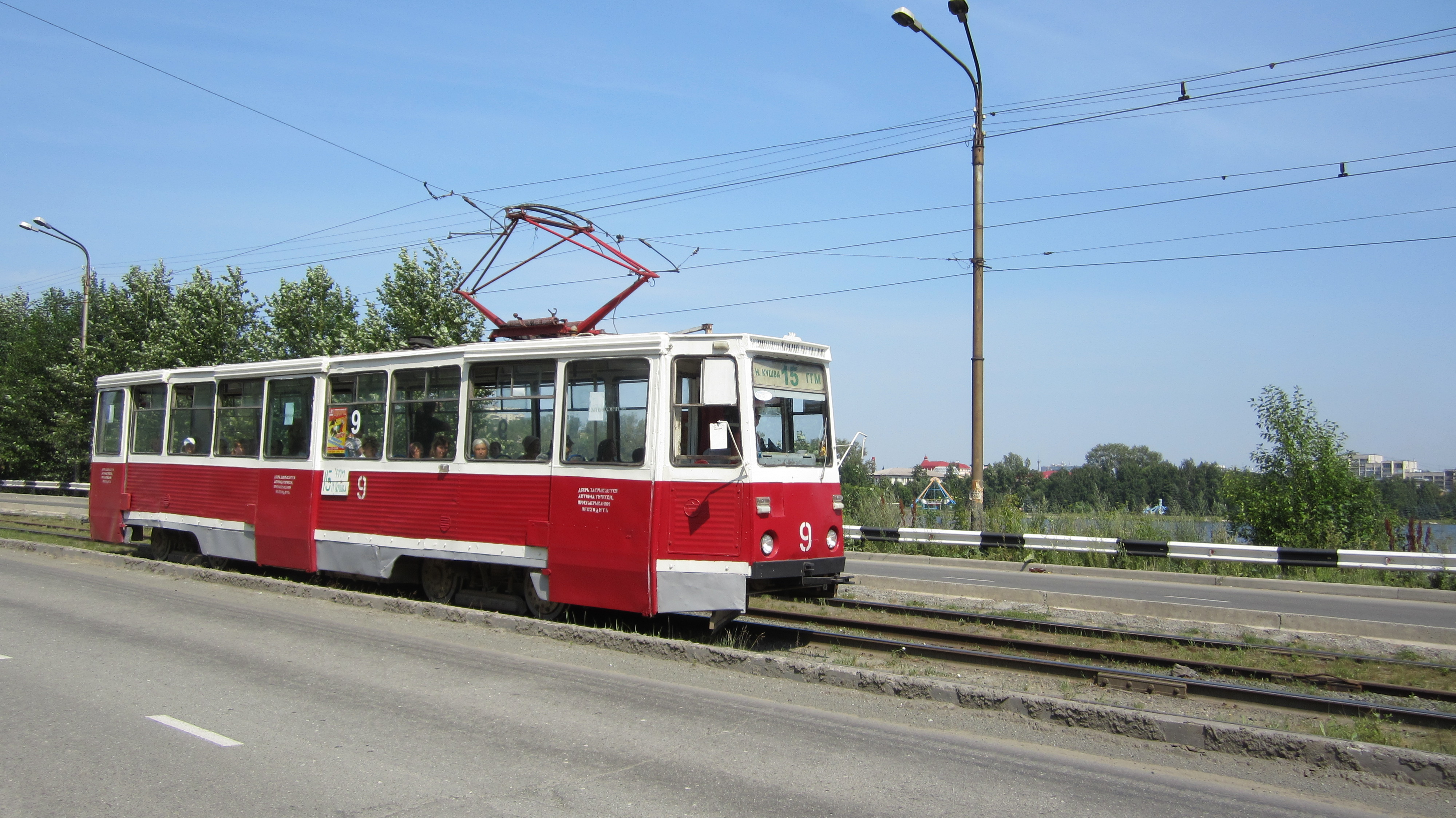 г.Нижний Тагил, Свердловская область